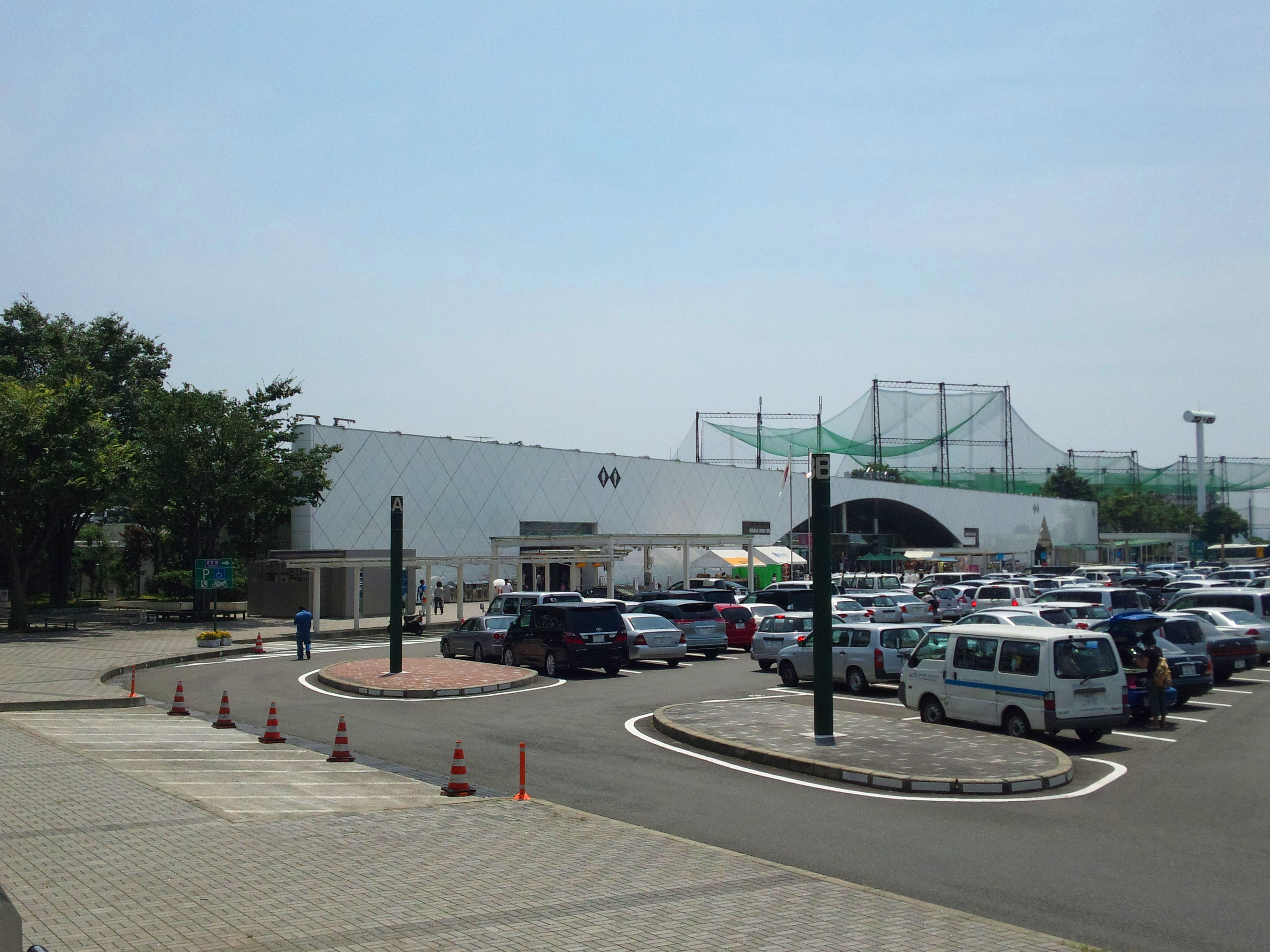 海老名サービスエリア下り線施設